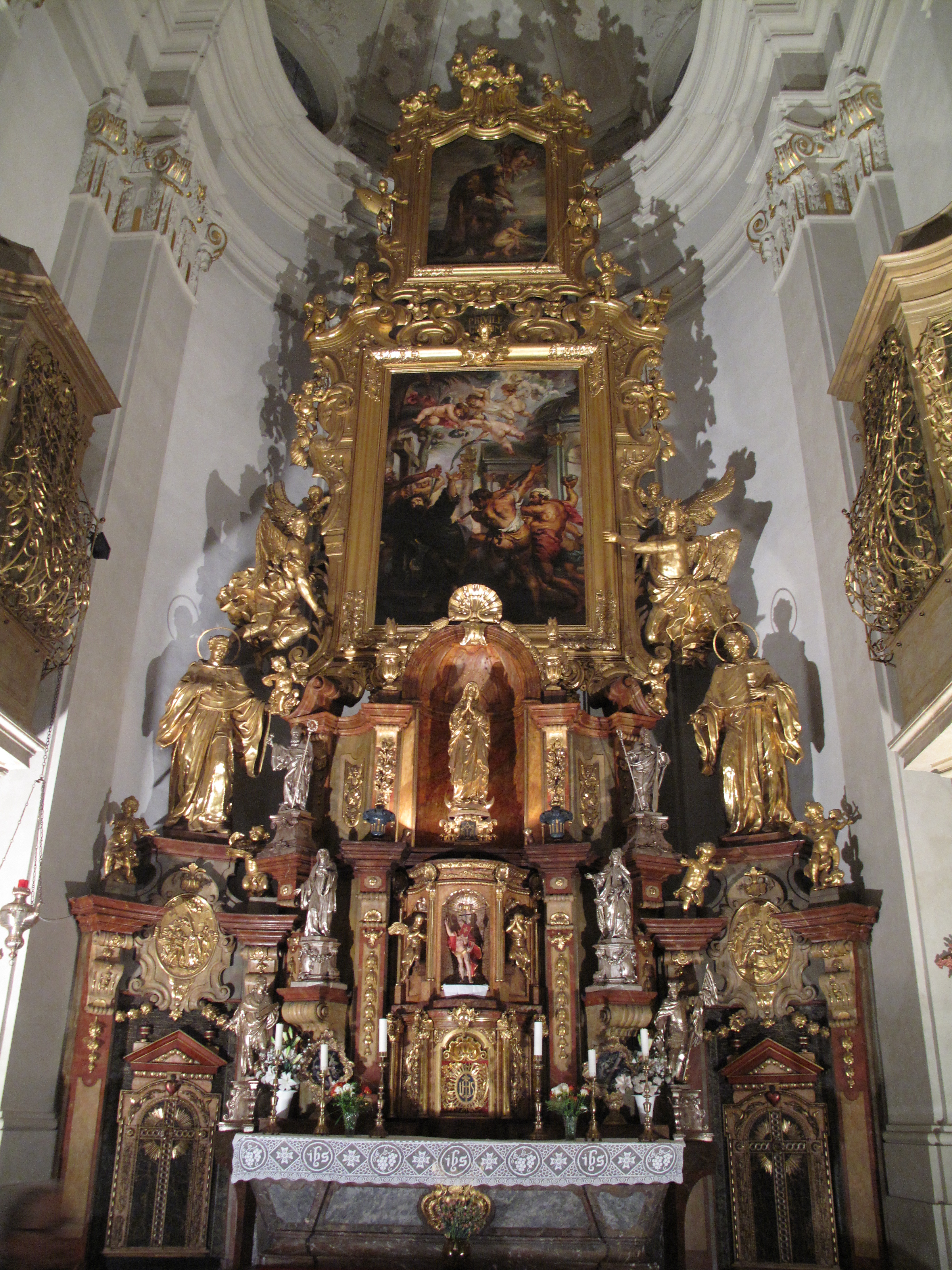 Kostel svatého Tomáše, Malá Strana, hlavní oltář